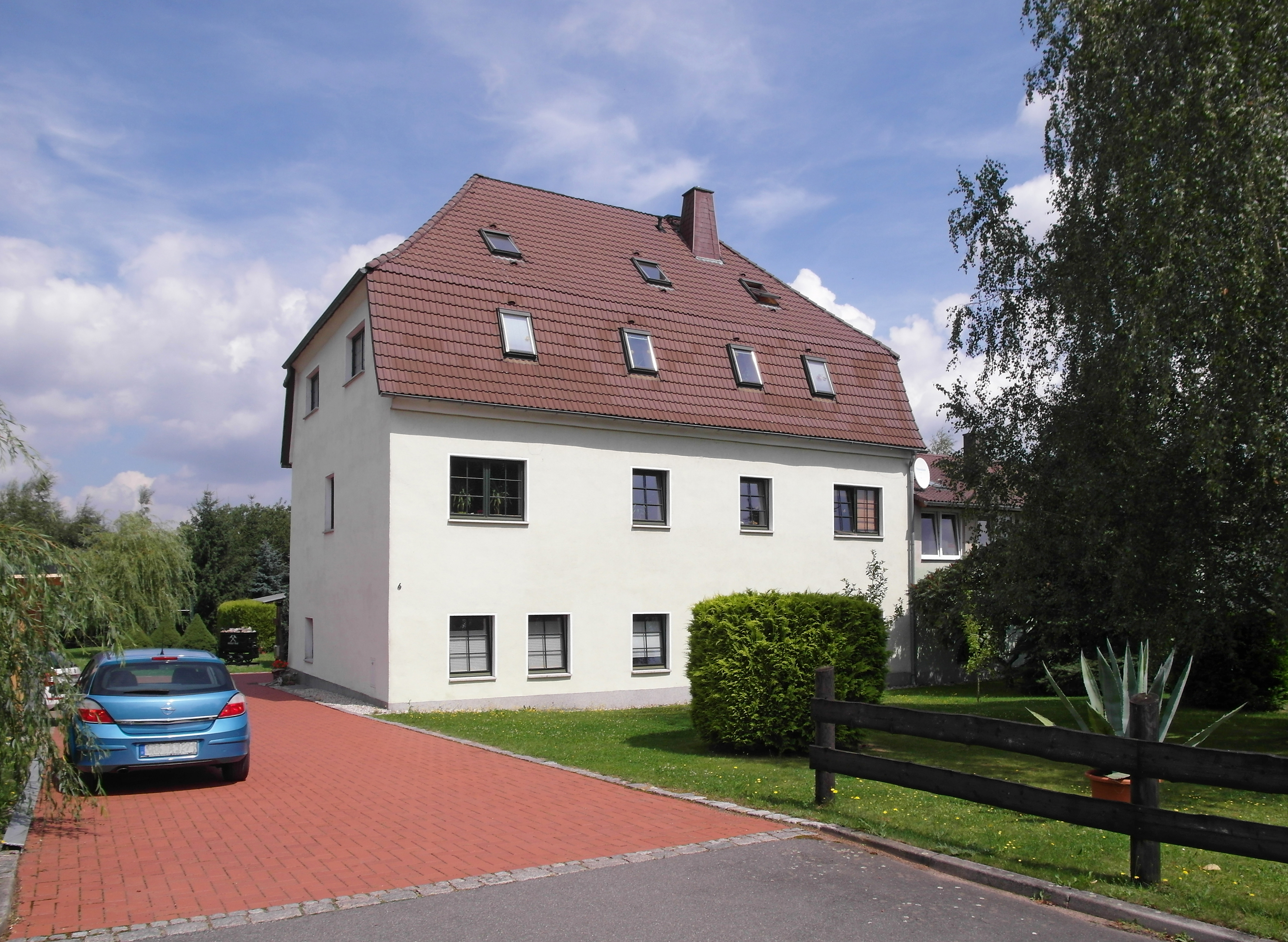 06.08.2017 09599 Halsbach (Freiberg): Kreuzermark 6: Ehem. Rittergut. Das Herrenhaus (GMP: 50.925768,13.385355) wurde nach 1945 abgebrochen. Hier das heute als Wohnhaus und Firmensitz genutzte einstige Gesindehaus (GMP: 50.925927,13.385592). [SAM1349.JPG]20170806515DR.JPG(c)Blobelt